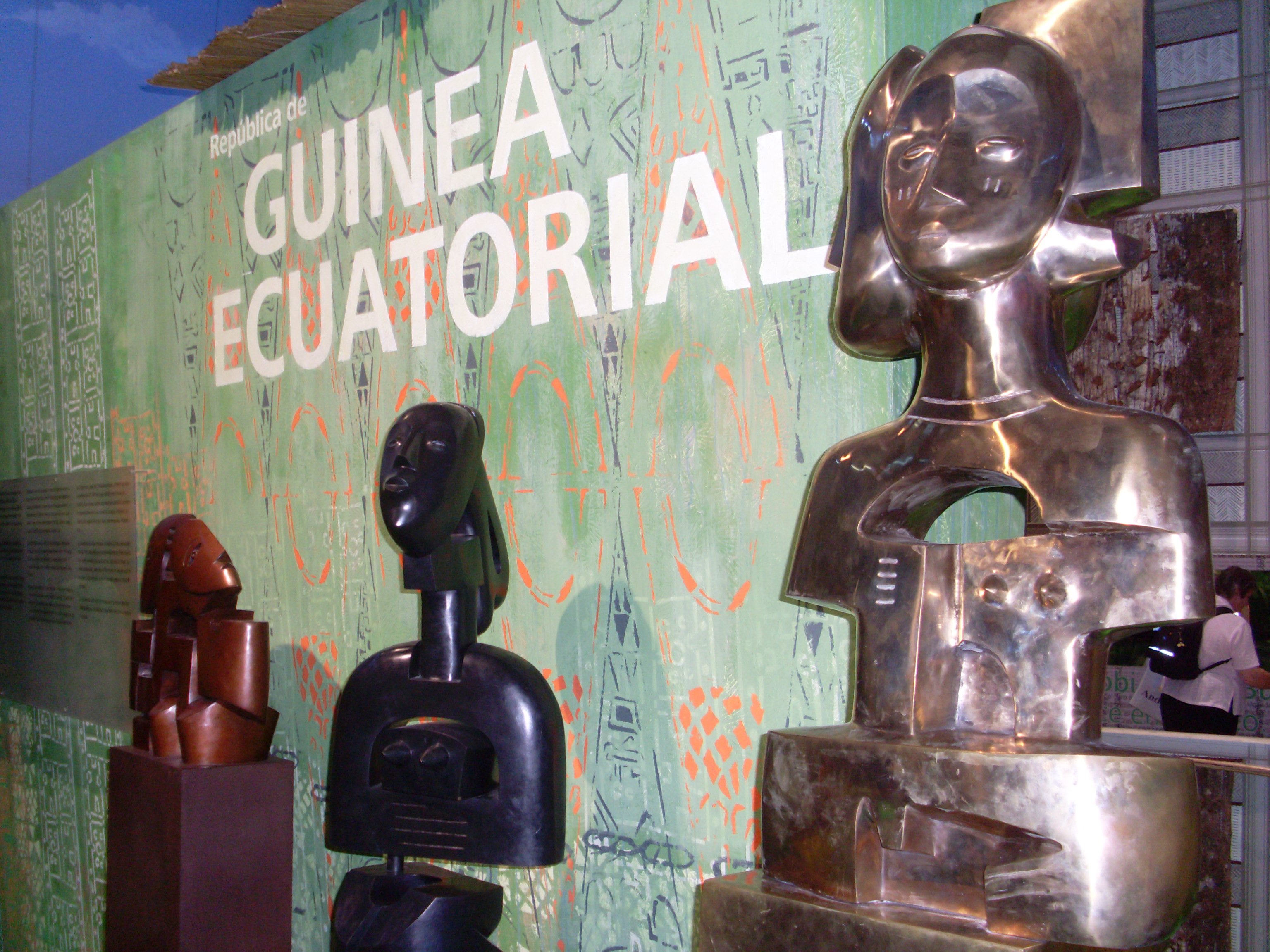 Stand de Guinea Ecuatorial, Expozaragoza 2008, Zaragoza, España. En primer plano, obra del escultor ecuatoguineano Leandro Mbomio.